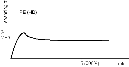 spanning_rek_diagramma_PE (HD) zelf, autoCAD+paint MADe 20 jun 2005 10:27 (CEST)